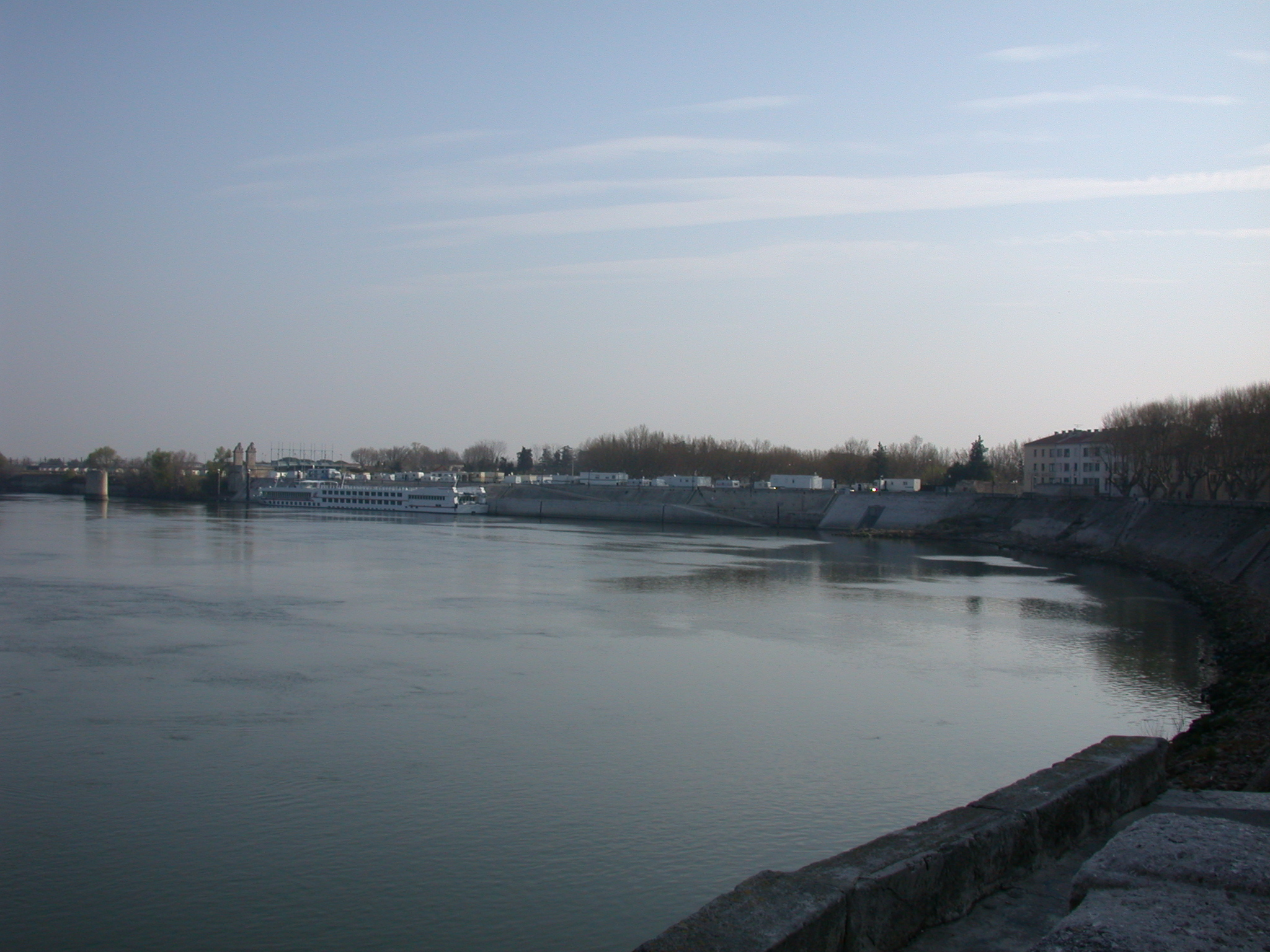 Arles (Francia), il fiume Rodano visto da presso le terme di Costantino. Foto personale aprile 2005 Categoria:Immagini esclusivamente in GNU FDL